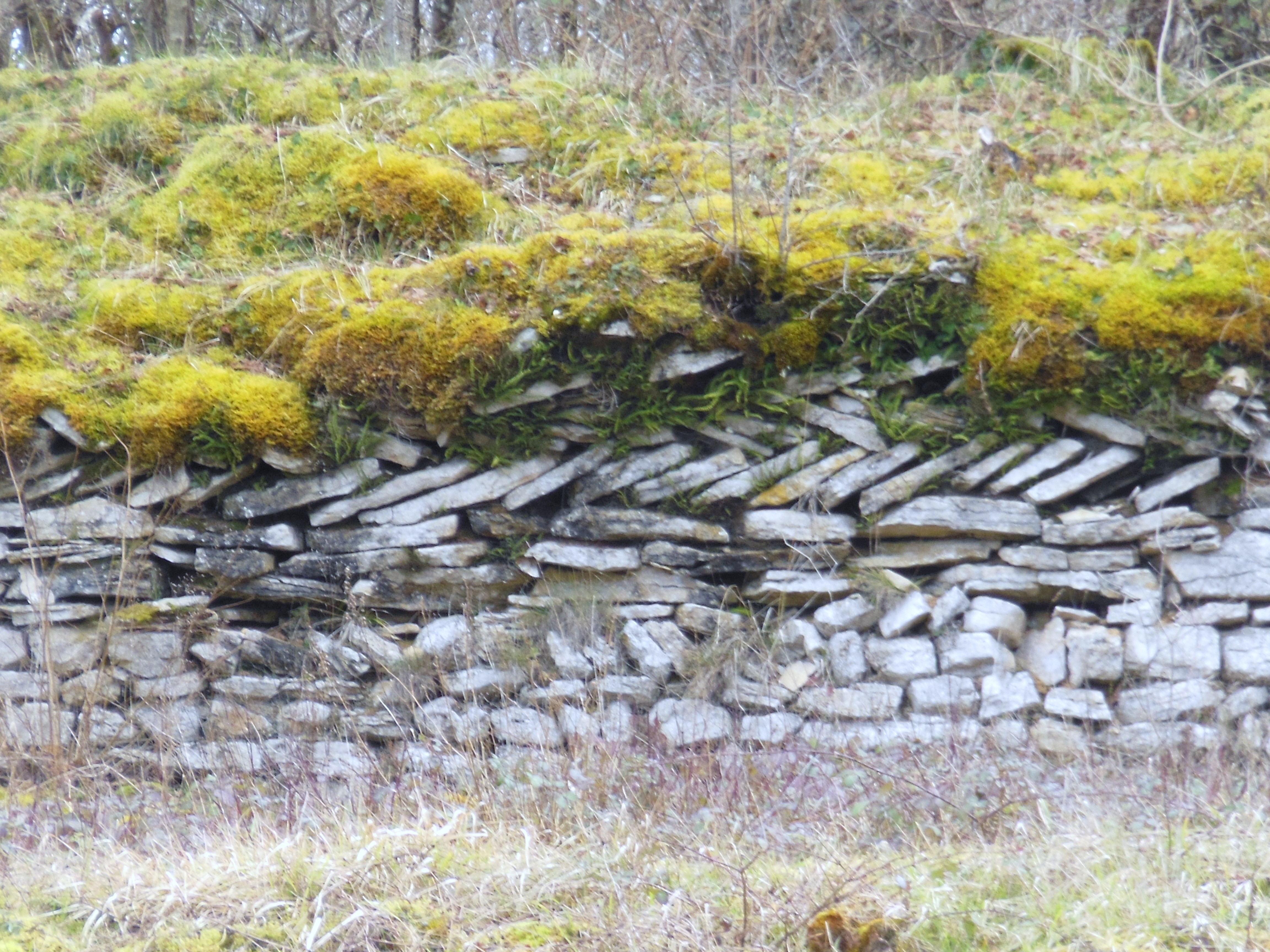 Composition et architecture de la base du mur d'enceinte du camp romain de Cora (Yonne, Bourgogne, France).